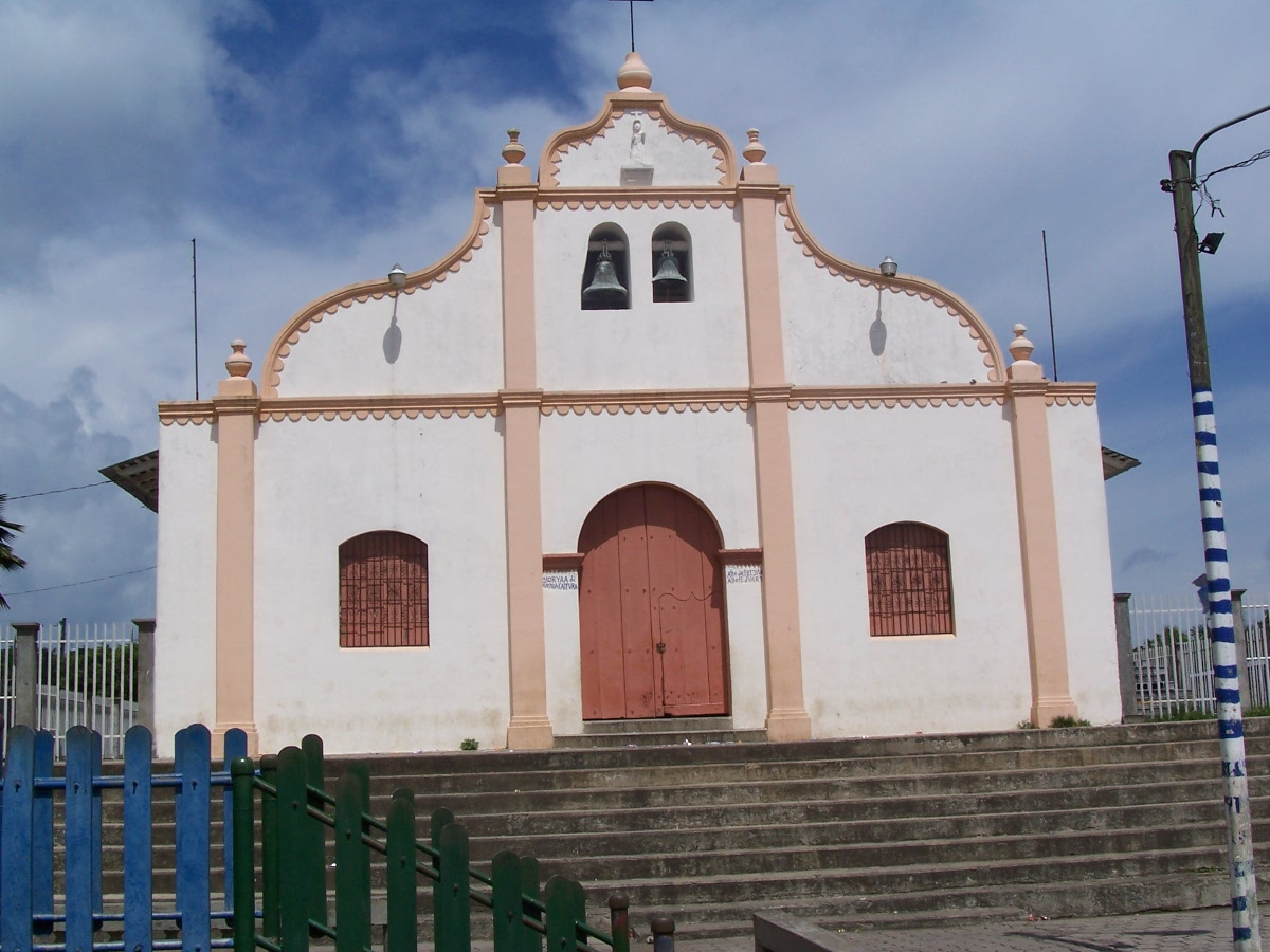 Parroquia de Santa Catalina